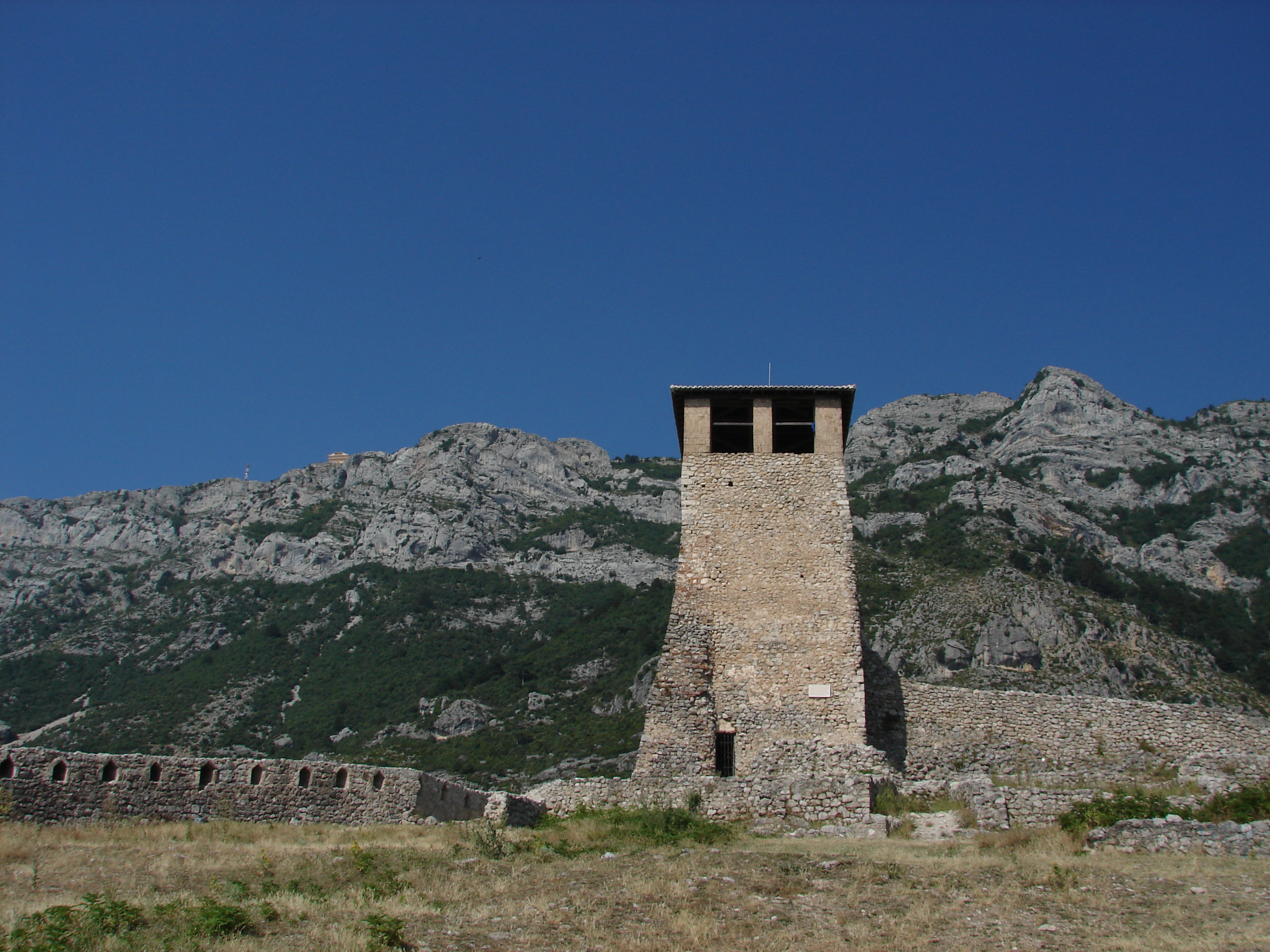 Kruje castle